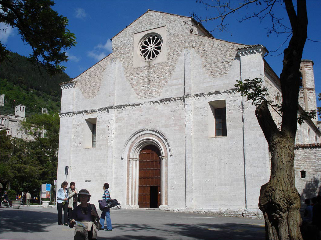 Igreja de S. Francisco, Gubbio